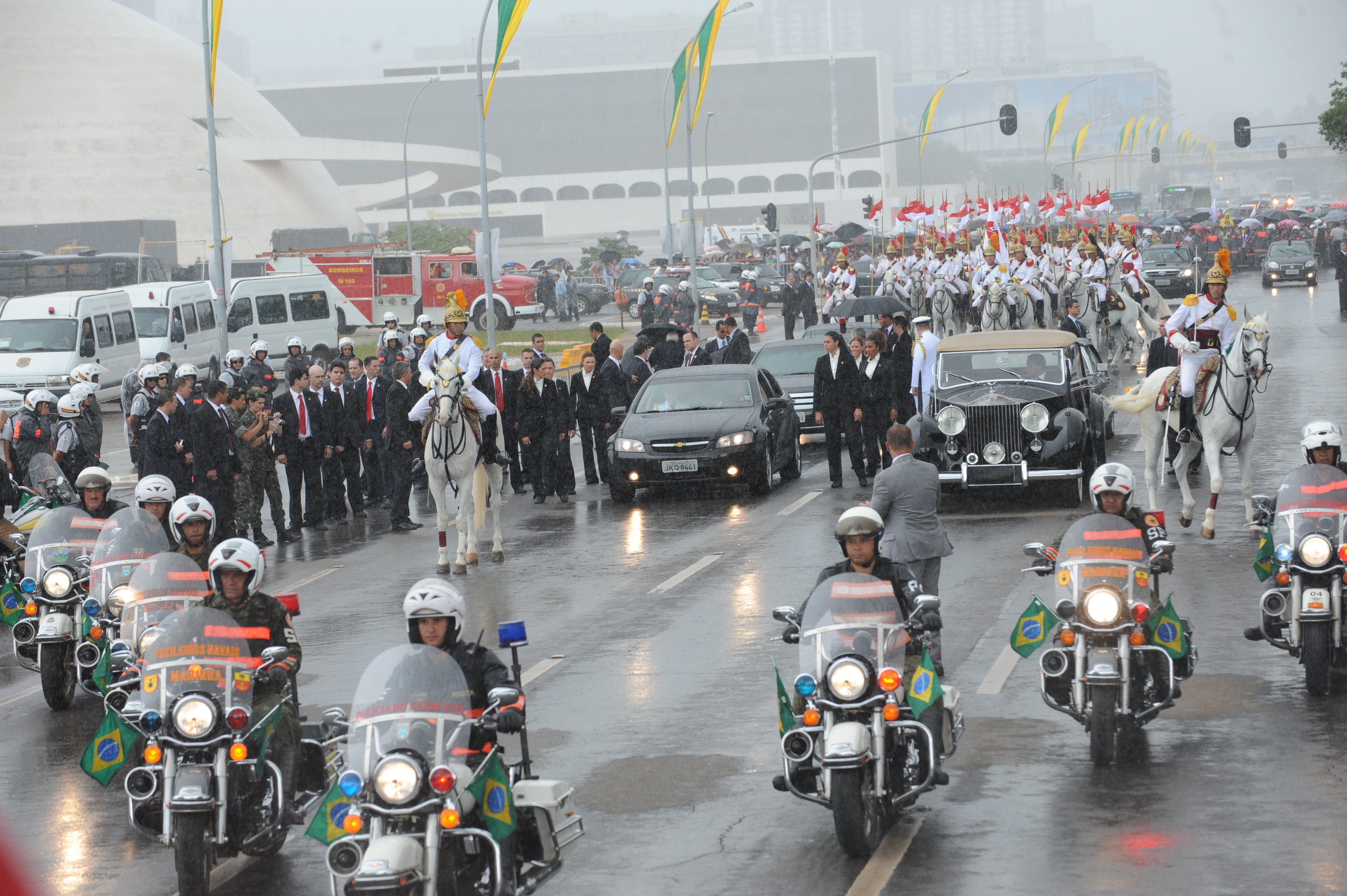 A presidenta eleita, Dilma Rousseff, chega à Esplanada dos Ministérios para cerimônia de posse. Brasília, 1º de janeiro de 2011.